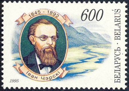 Беларуская (тарашкевіца): Ян Чэрскі. Белпошта